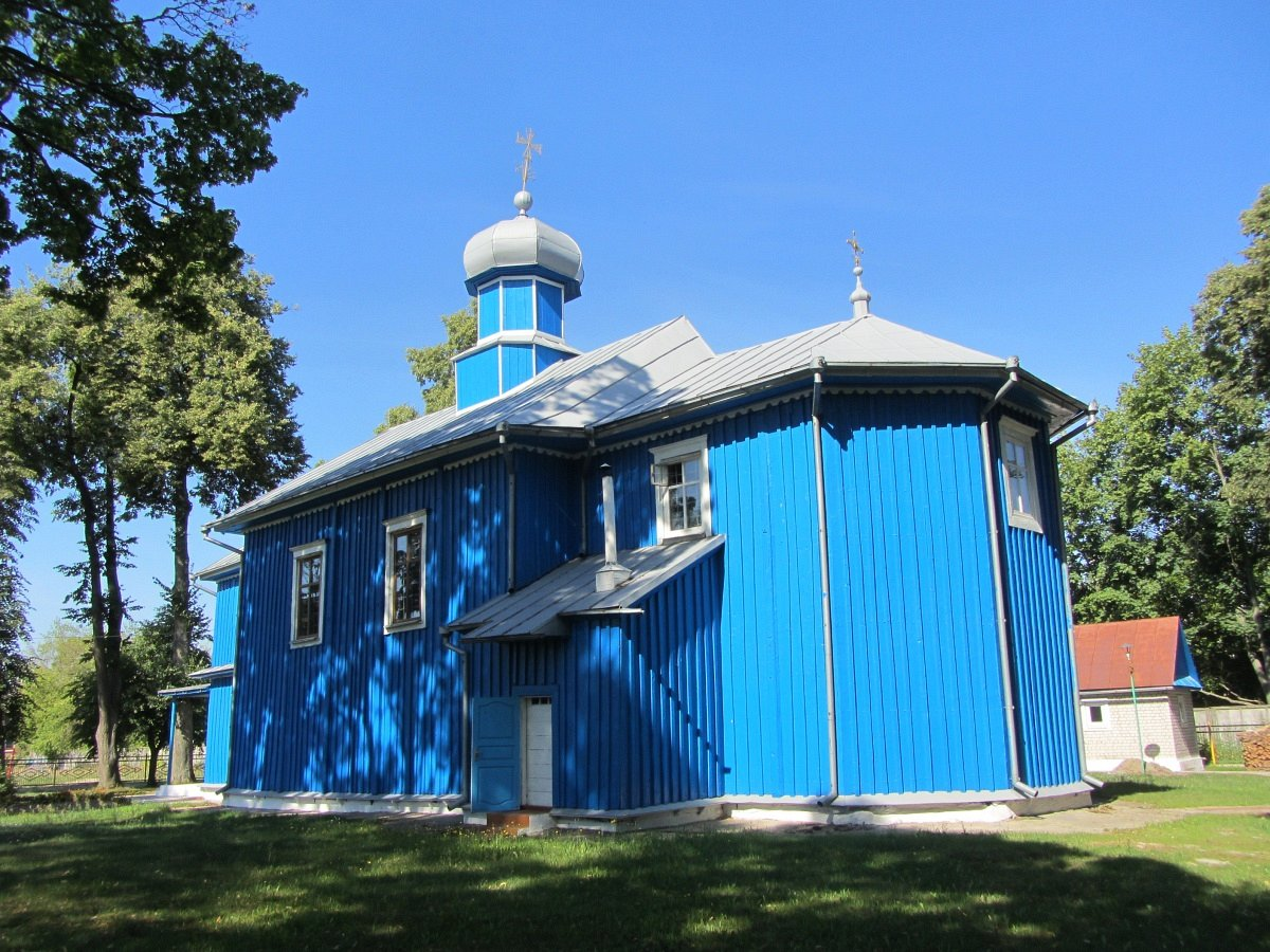 Жабчыцы (Садовы). Свята-Параскева-Пятніцкая царква